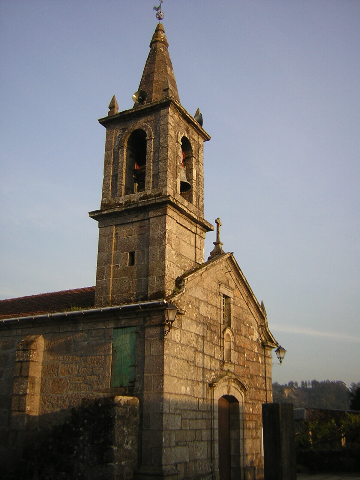 Igrexa de Parderrubias, no Concello de Salceda de Caselas, Provincia de Pontevedra (Galicia)